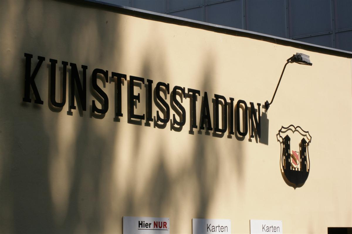 Eingang am Kunsteisstadion